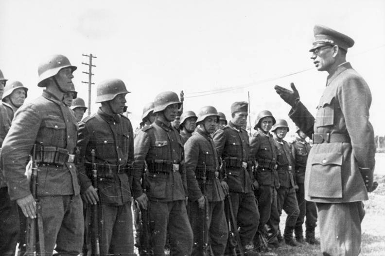 ADN-ZB II.Weltkrieg 1939-1945 Der russische General Wlassow spricht nach beendeter Felddienstübung zu sowjetischen Kollaborateuren in der Uniform der Naziwehrmacht.